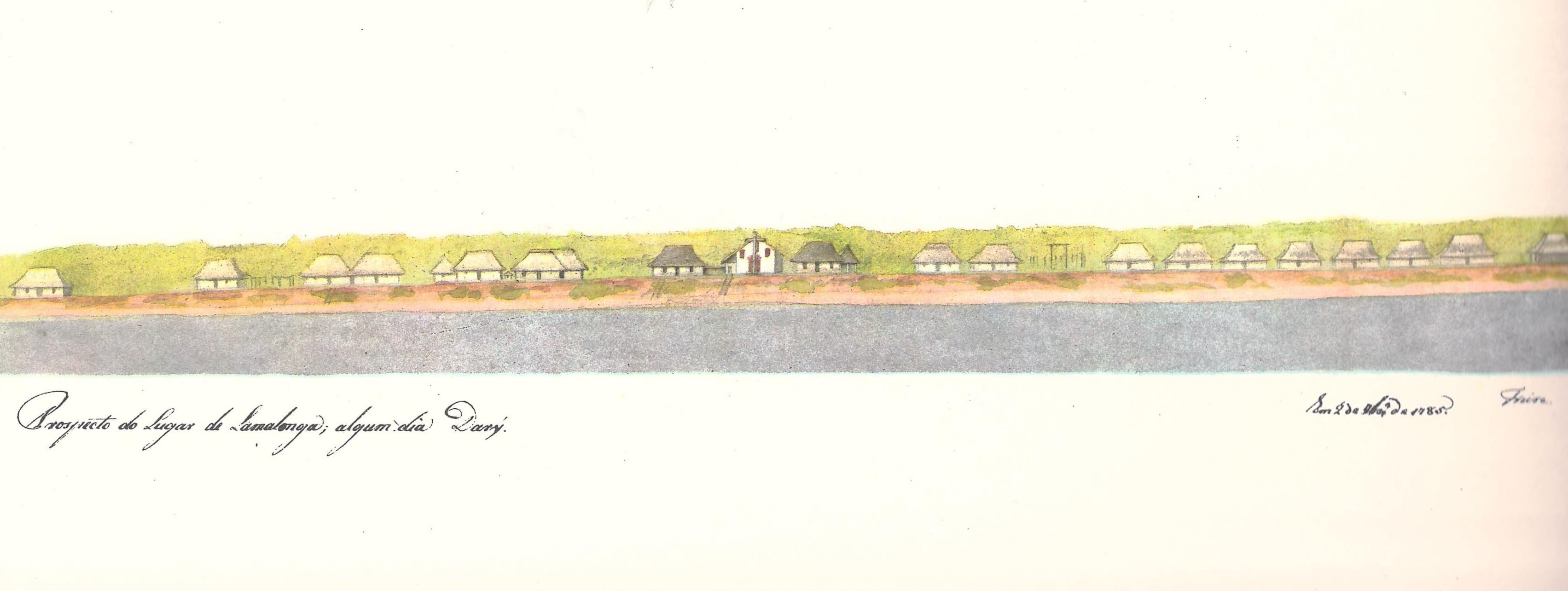 Ilustração em Viagem Filosófica pelas capitanias do Grão Pará, Rio Negro, Mato Grosso e Cuiabá.